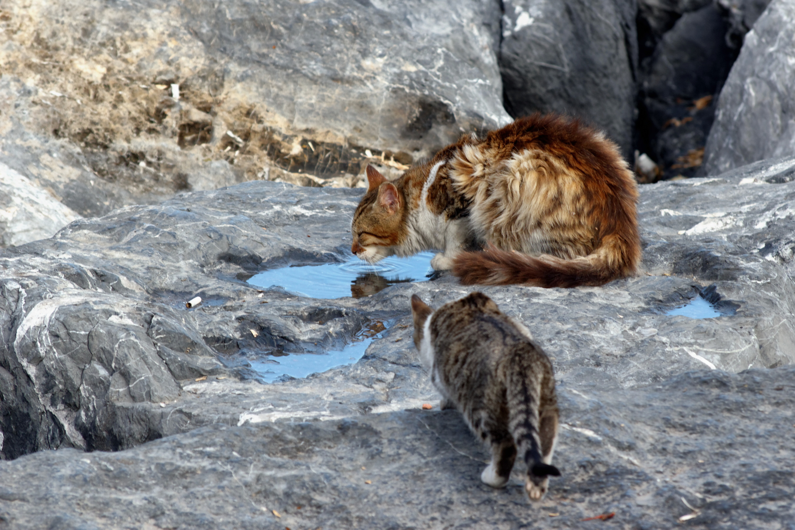 Istanbul Стамбул